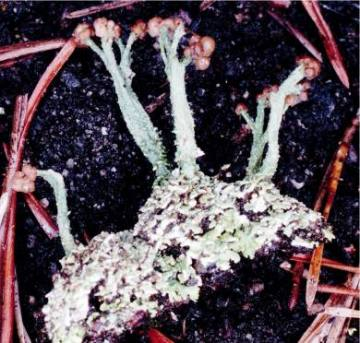 Cladonia peziziformis